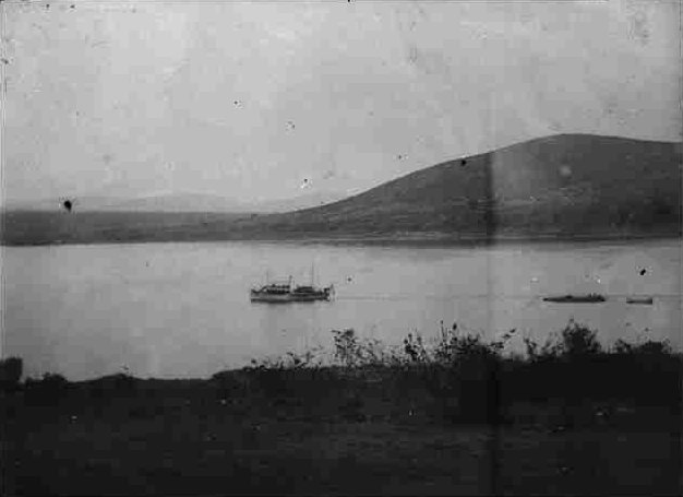 Deutscher Zollkreuzer „Kingani“ mit Geschützfloß im Ersten Weltkrieg. Region: Ostafrika Tanganjikasee Text auf der Hülle: Neg. Kpt. Zimmer / Kingani mit Geschützfloss